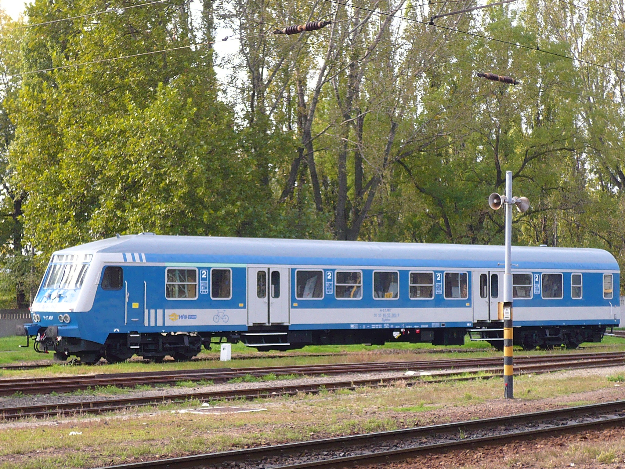 MÁV vezérlőkocsi